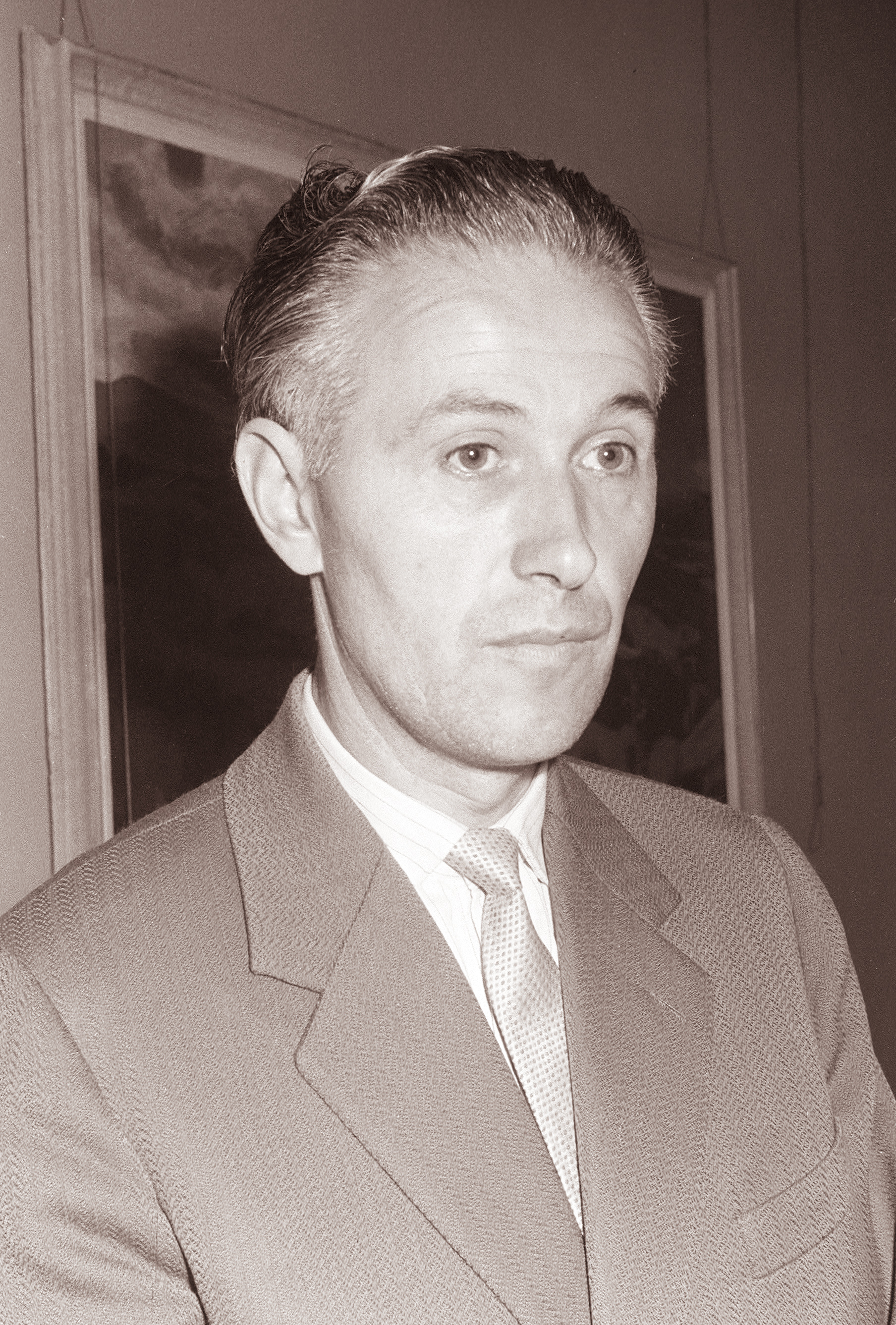 Karel Pečko